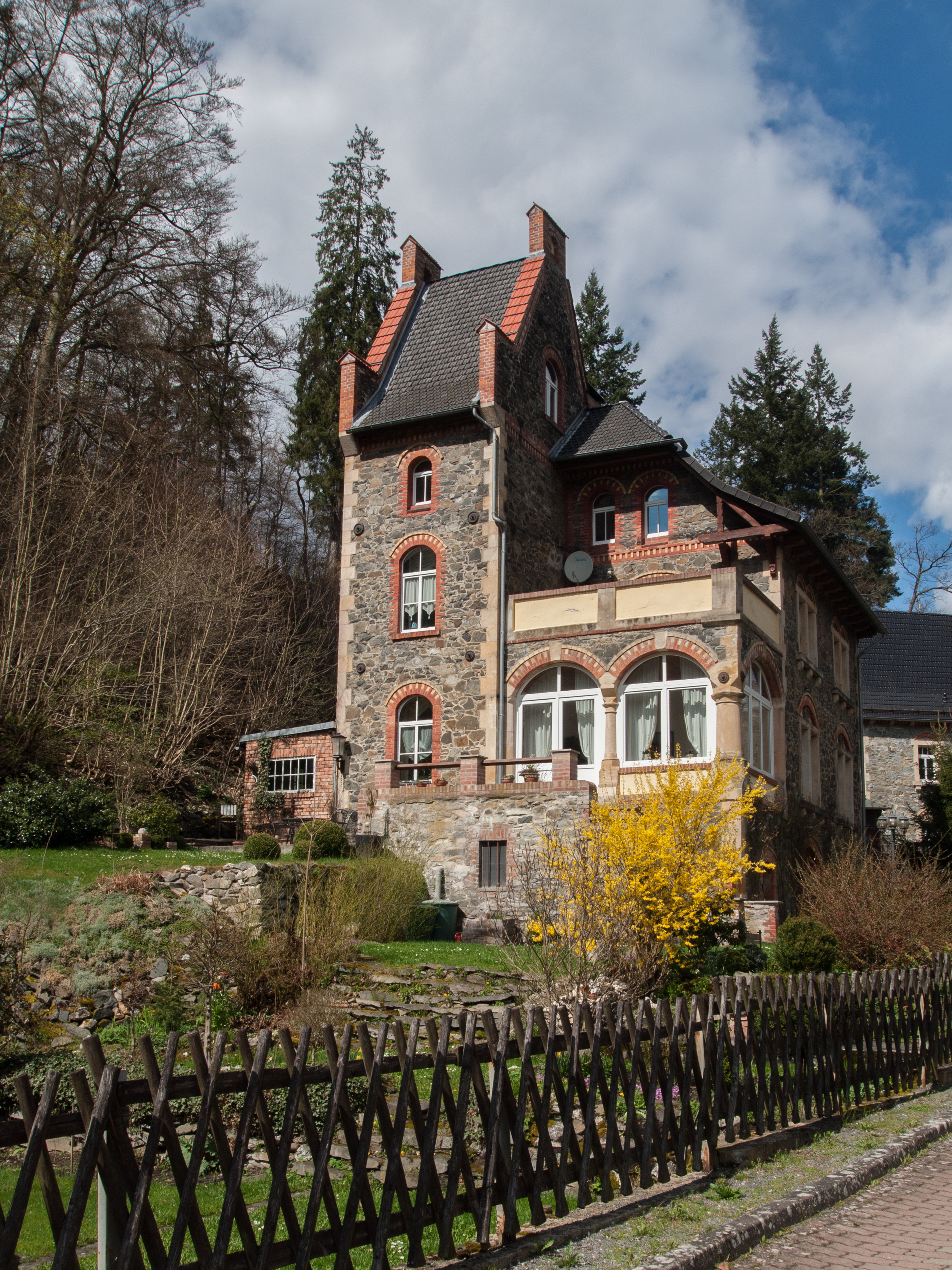 Treseburg (Stadt Thale, Landkreis Harz; Sachsen-Anhalt) An der Halde 2